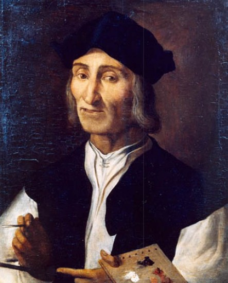 Self-portrait Marco Palmezzano